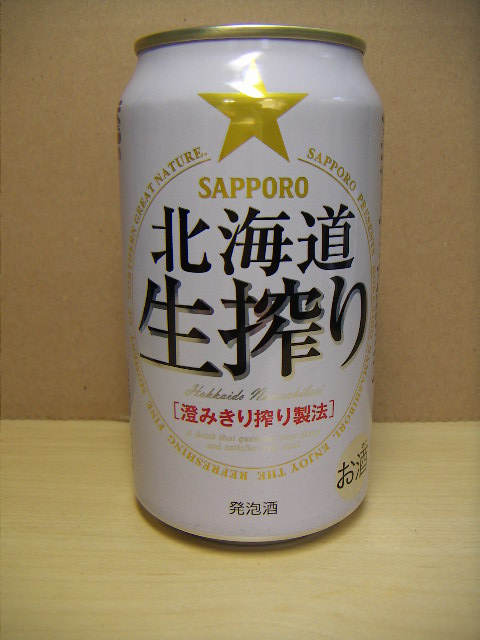 缶350ml